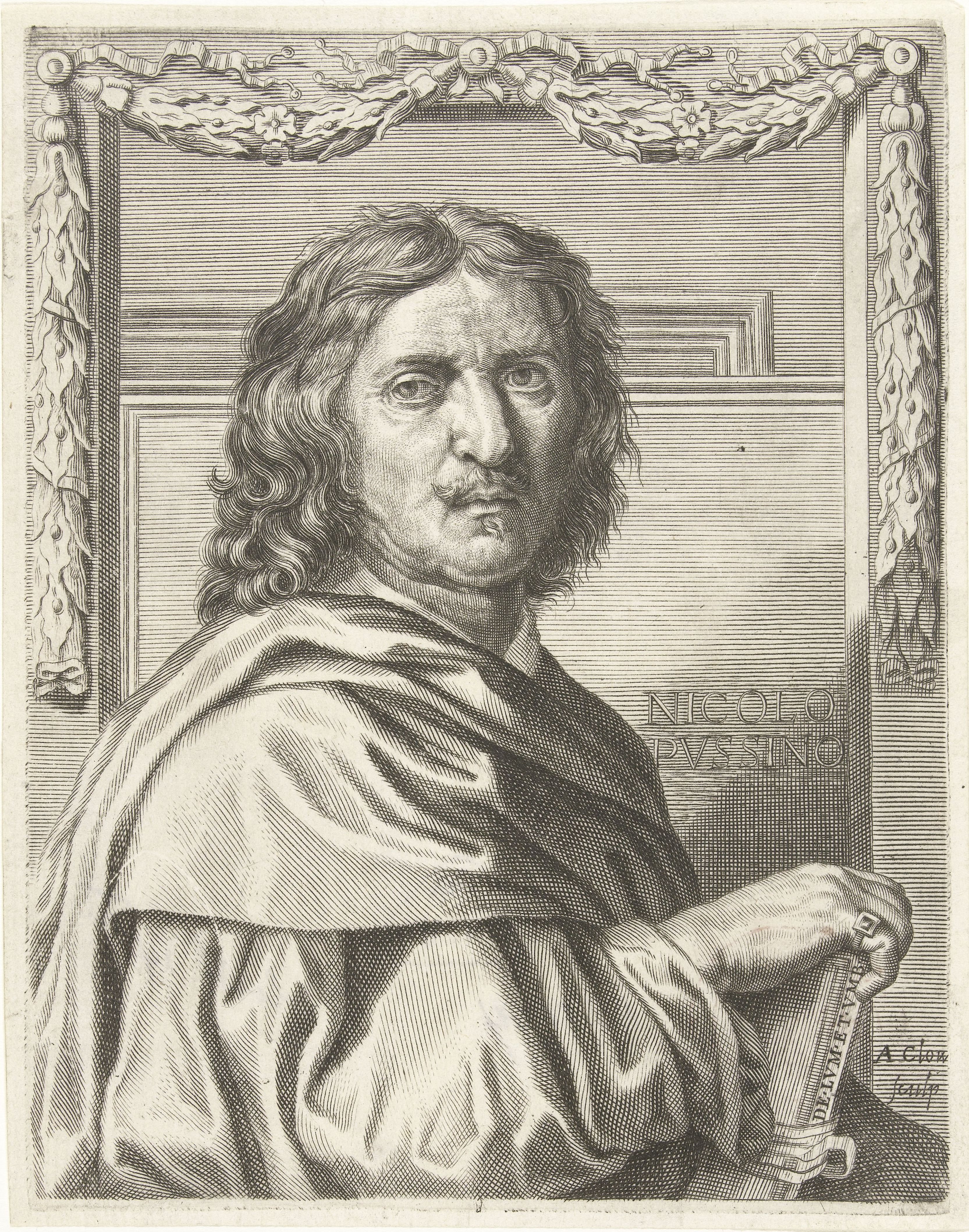 IdentificatieTitel(s): Portret van Nicolas PoussinObjecttype: prent boekillustratie Objectnummer: RP-P-BI-5904Catalogusreferentie: Hollstein Dutch 6Opschriften / Merken: verzamelaarsmerk, verso linksonder, gestempeld: Lugt 240Omschrijving: Portret van Nicolas Poussin, een Franse schilder. Buste naar rechts. Hij heeft een boek vast over de wetenschap van het schilderen.VervaardigingVervaardiger: prentmaker: Albertus Clouwet (vermeld op object)naar schilderij van: Nicolas PoussinPlaats vervaardiging: RomeDatering: 1672Fysieke kenmerken: gravureMateriaal: papier Techniek: graveren (drukprocedé)Afmetingen: plaatrand: h 152 mm × b 118 mmToelichtingillustratie voor: Giovanni Pietro Bellori, "Vite de' pittori, scultori et architetti moderni", Rome, 1672.OnderwerpWie: Nicolas PoussinVerwerving en rechtenVerwerving: overdracht van beheer 1816Copyright: Publiek domein